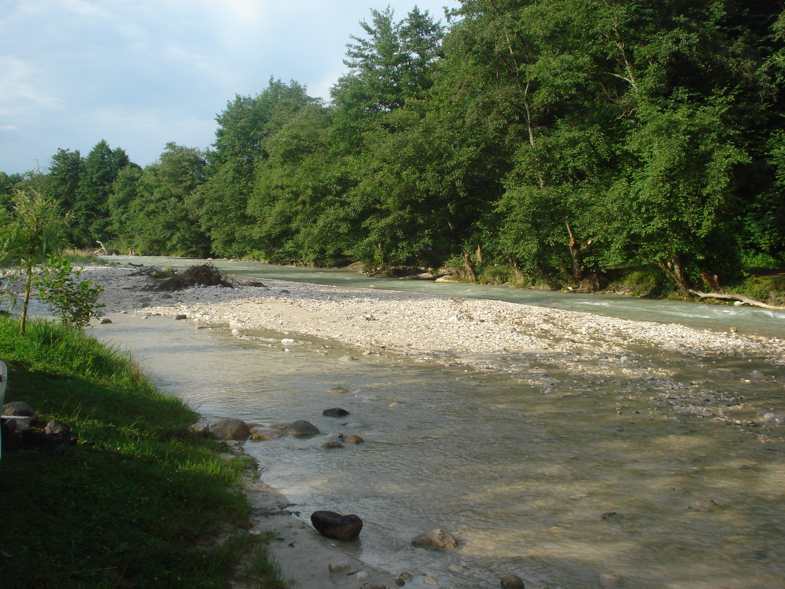 Река Урсдон в Северной Осетии